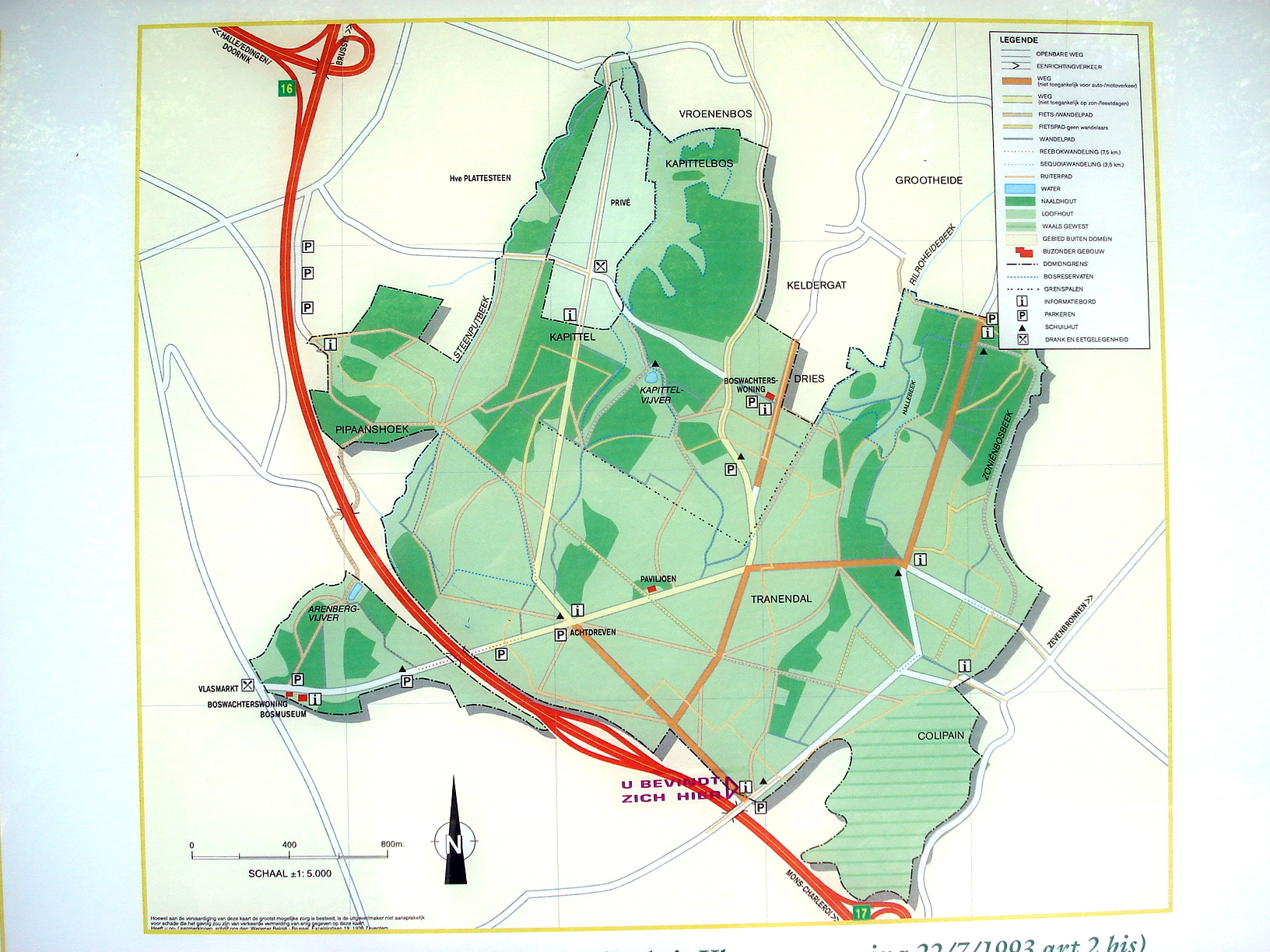 Plan du bois de Hal (Hallerbos). Plan affiché à divers endroits dans le bois.